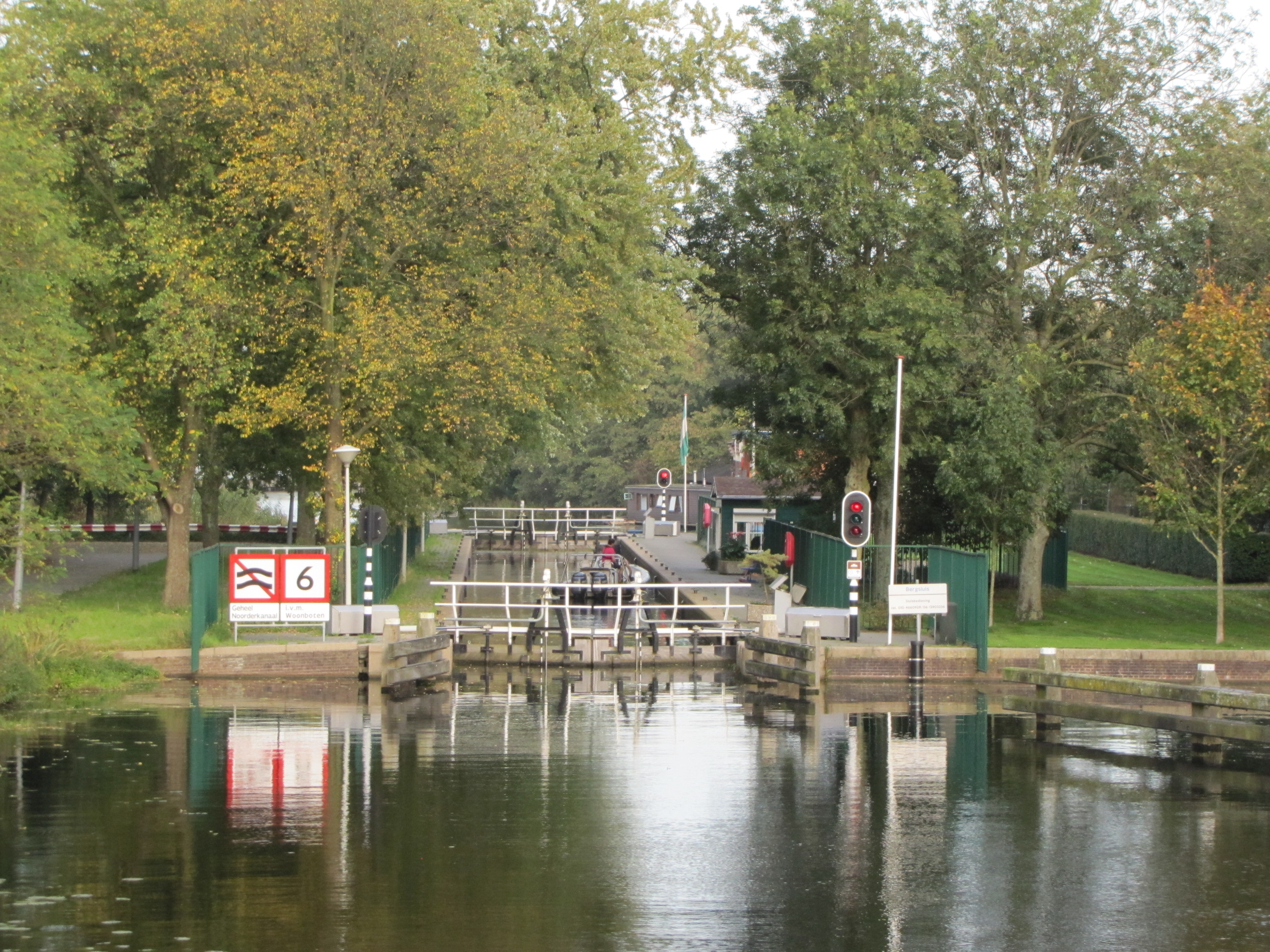 Écluse Bergsluis du canal nord Rotterdam, photo prise du pont Gordelbrug, 2017